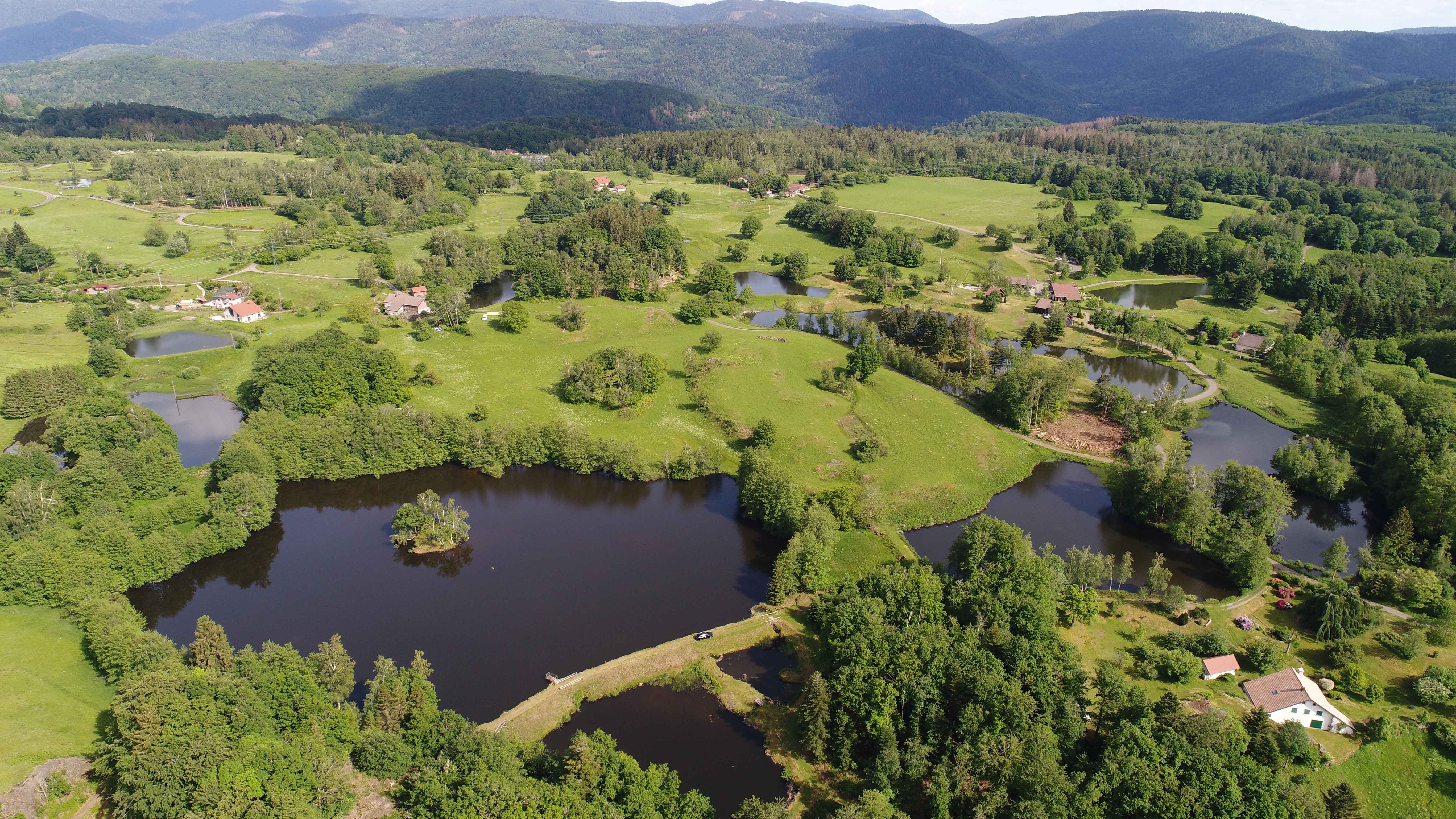 Plusieurs étangs de Servance sur le Plateau des mile étangs.